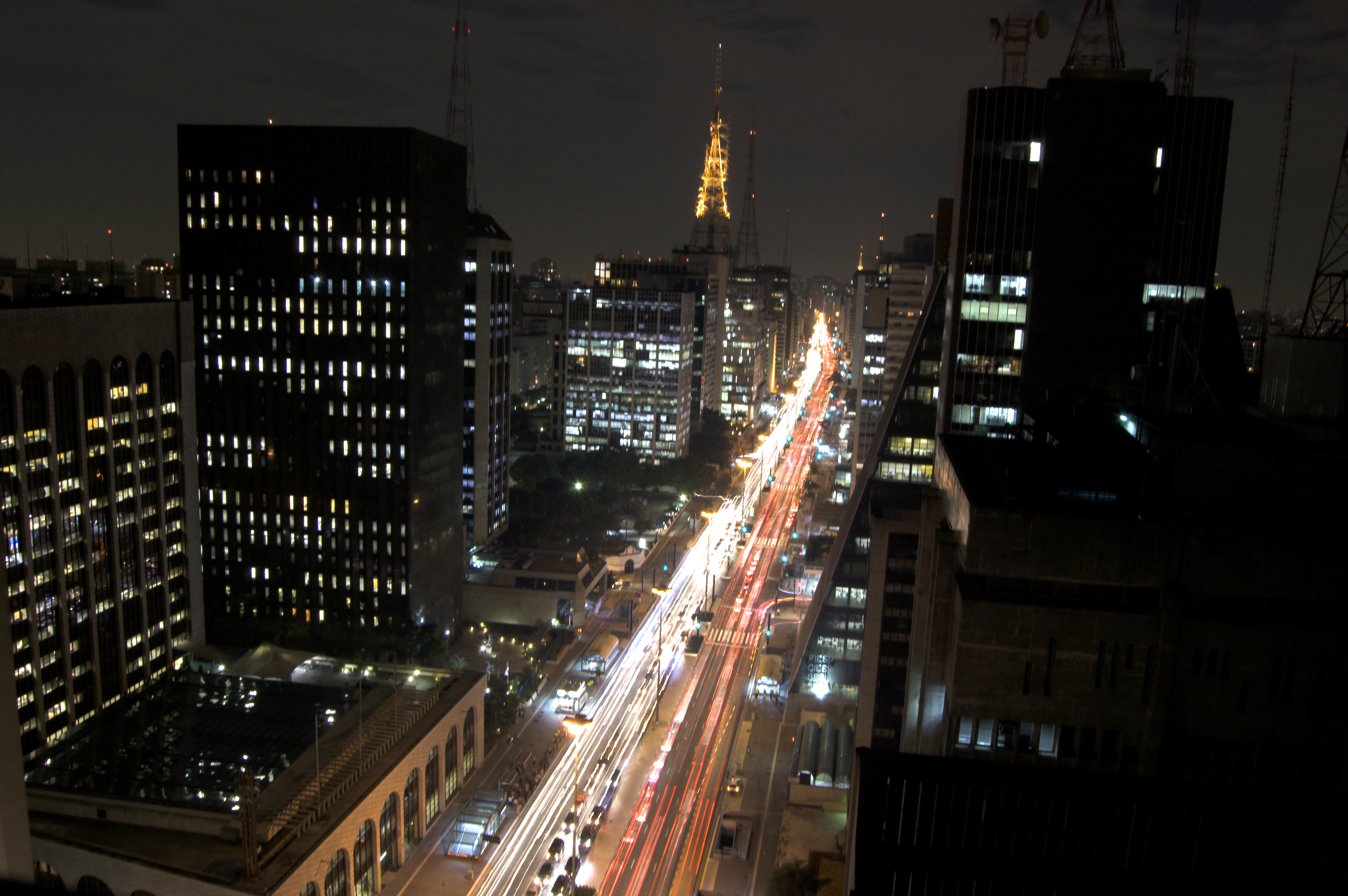 Avenida Paulista, em São Paulo, Brasil